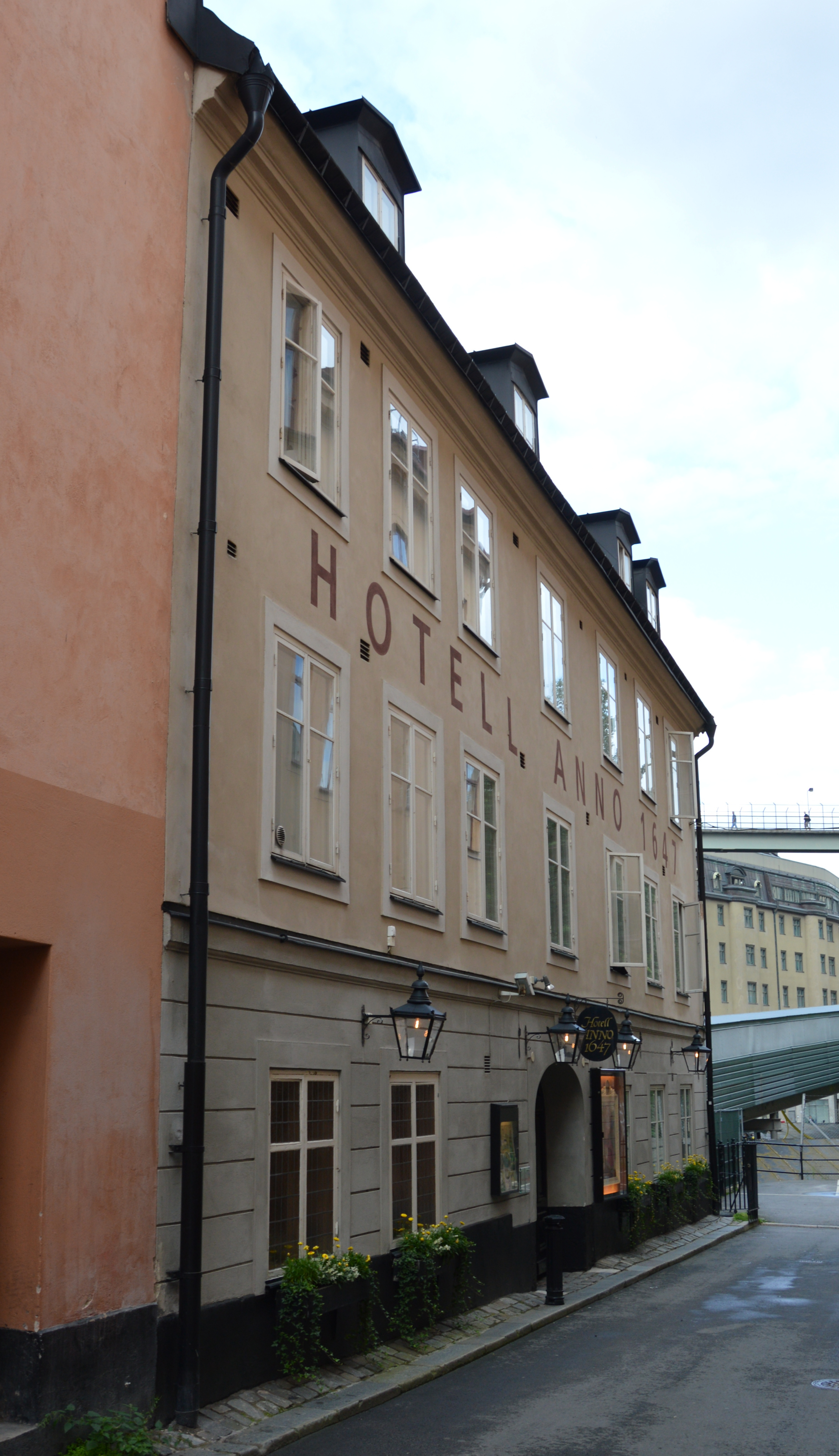 Hotel Anno 1647 Stockholm